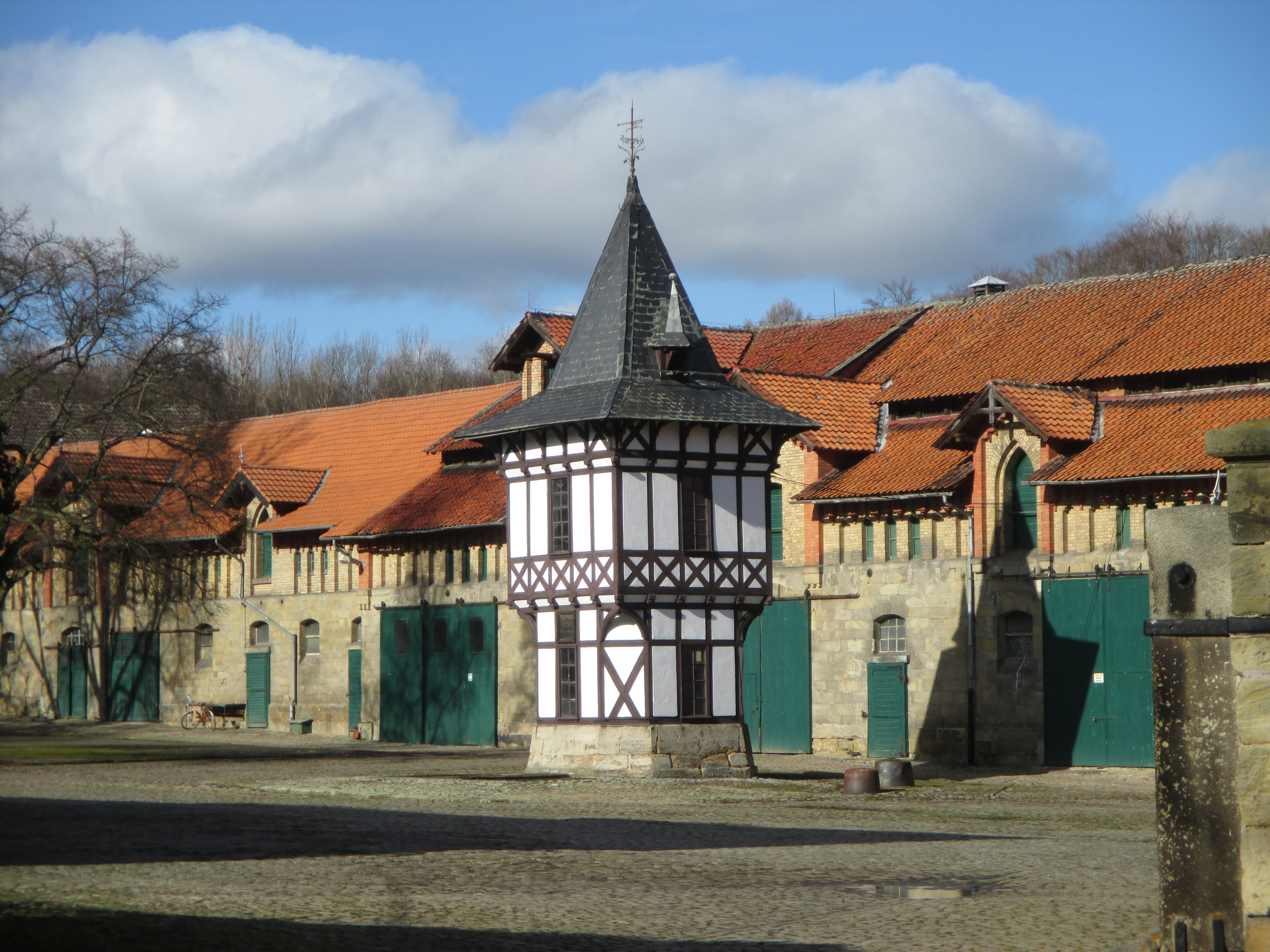 Gutshof des Gielder Ortsteils Altenrode in der Gemeinde Schladen-Werla